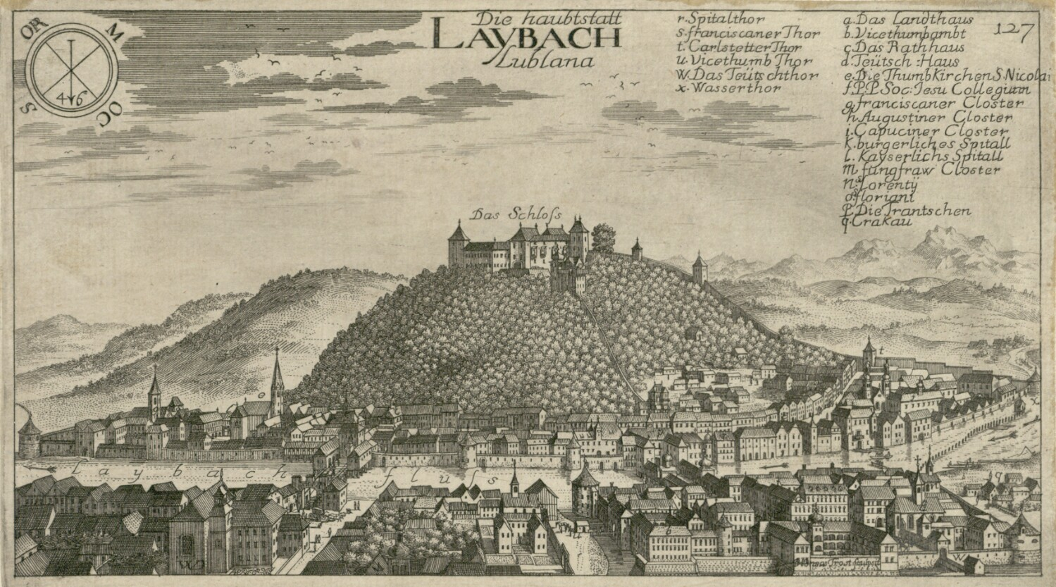 Ljubljana